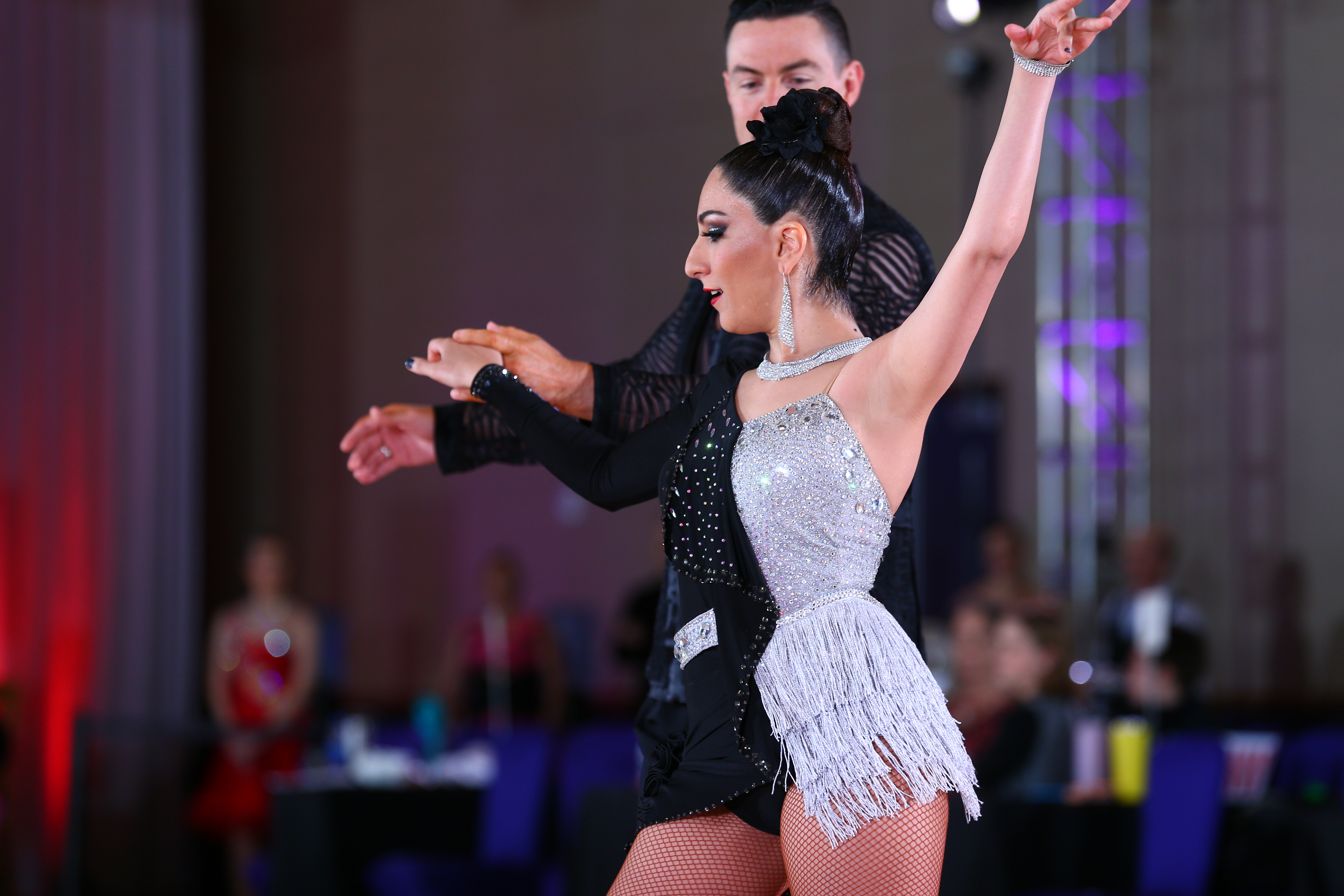 في فندق حياة ريجينسي في مينيابوليس